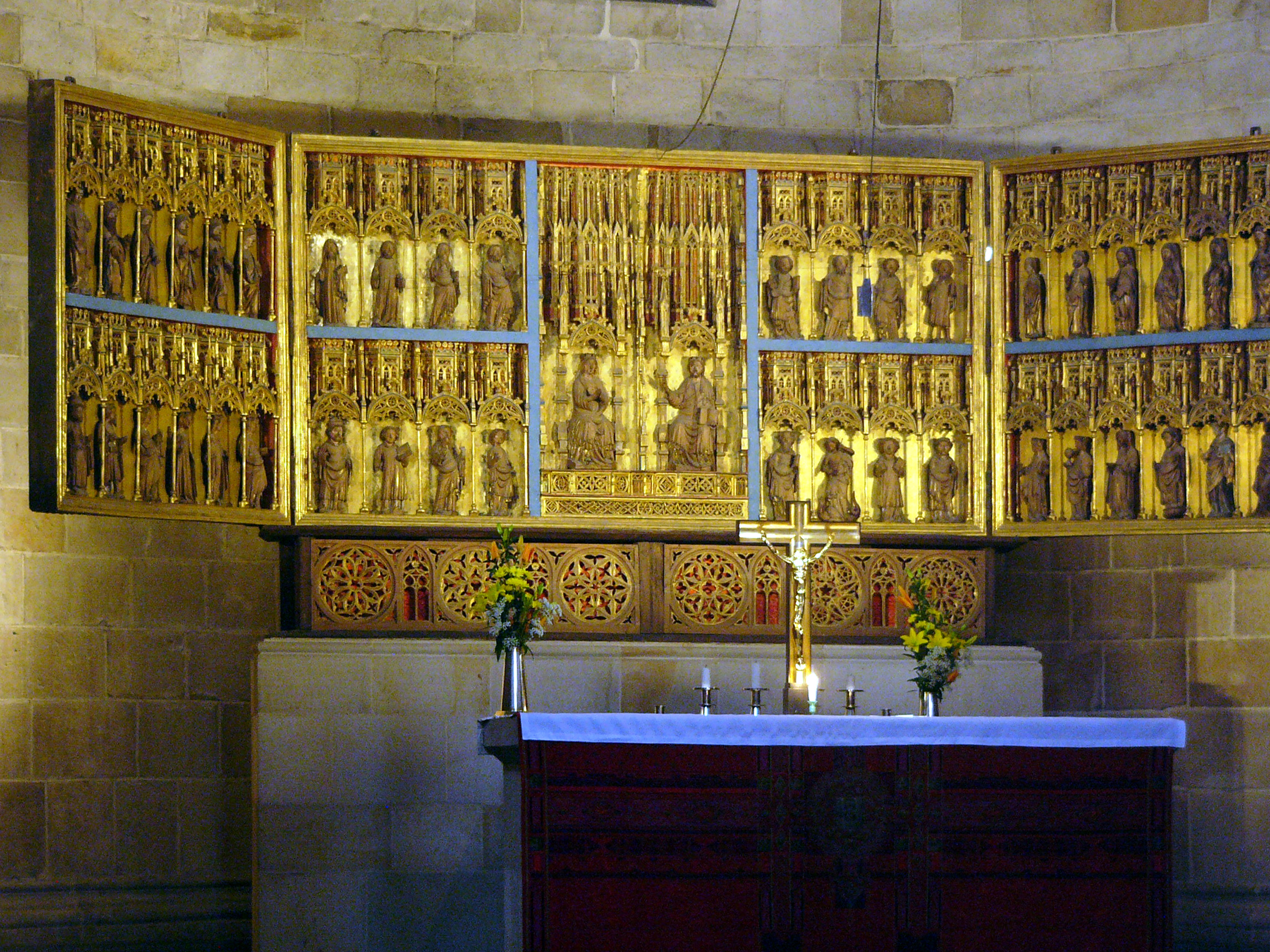 1103/04 errichtete Papst Paschalis II. auf dänische Initiative das Erzbistum Lund. Dom zu Lund. Altartafel von kurz vor 1398.